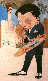 Caricatura que representa al pintor peruano Alejandro González Trujillo.